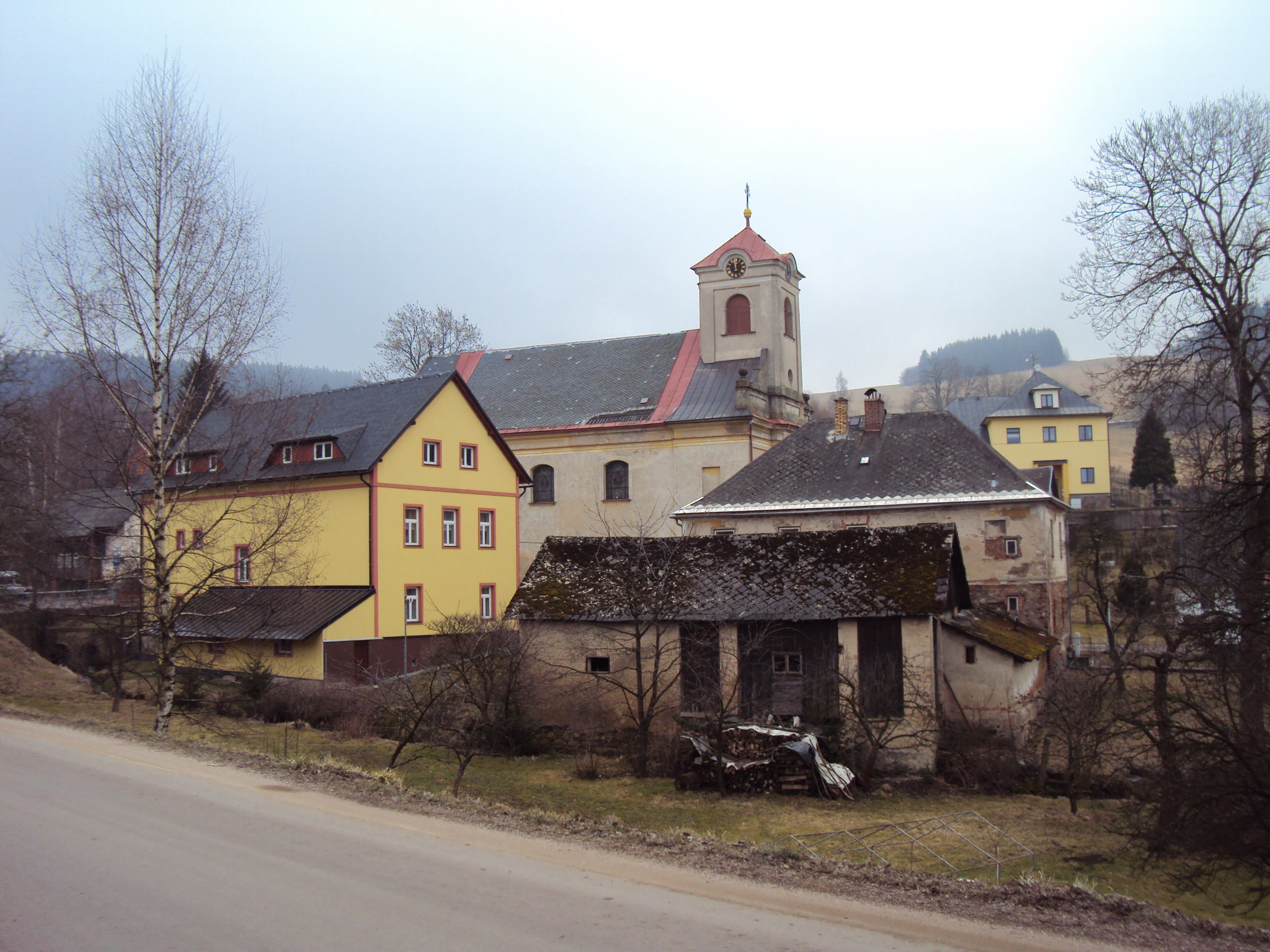 Vesnice Čenkovice 02